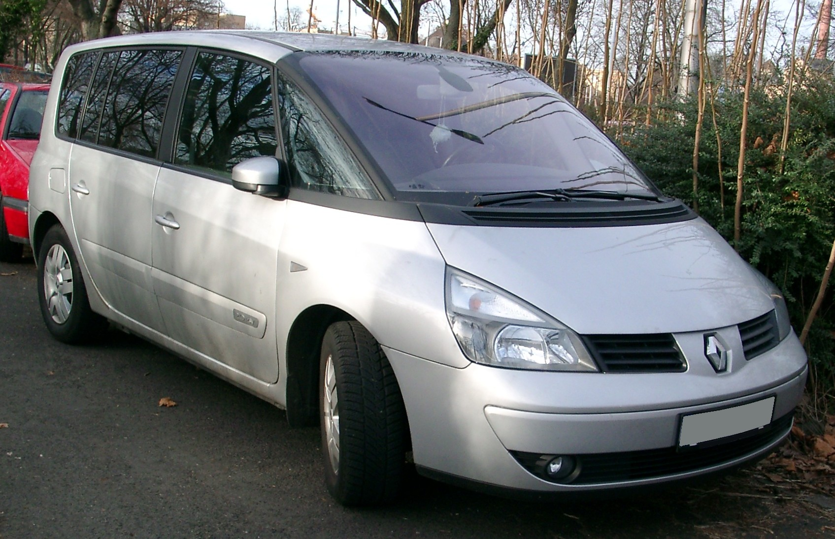 Renault Espace, 4. Generation